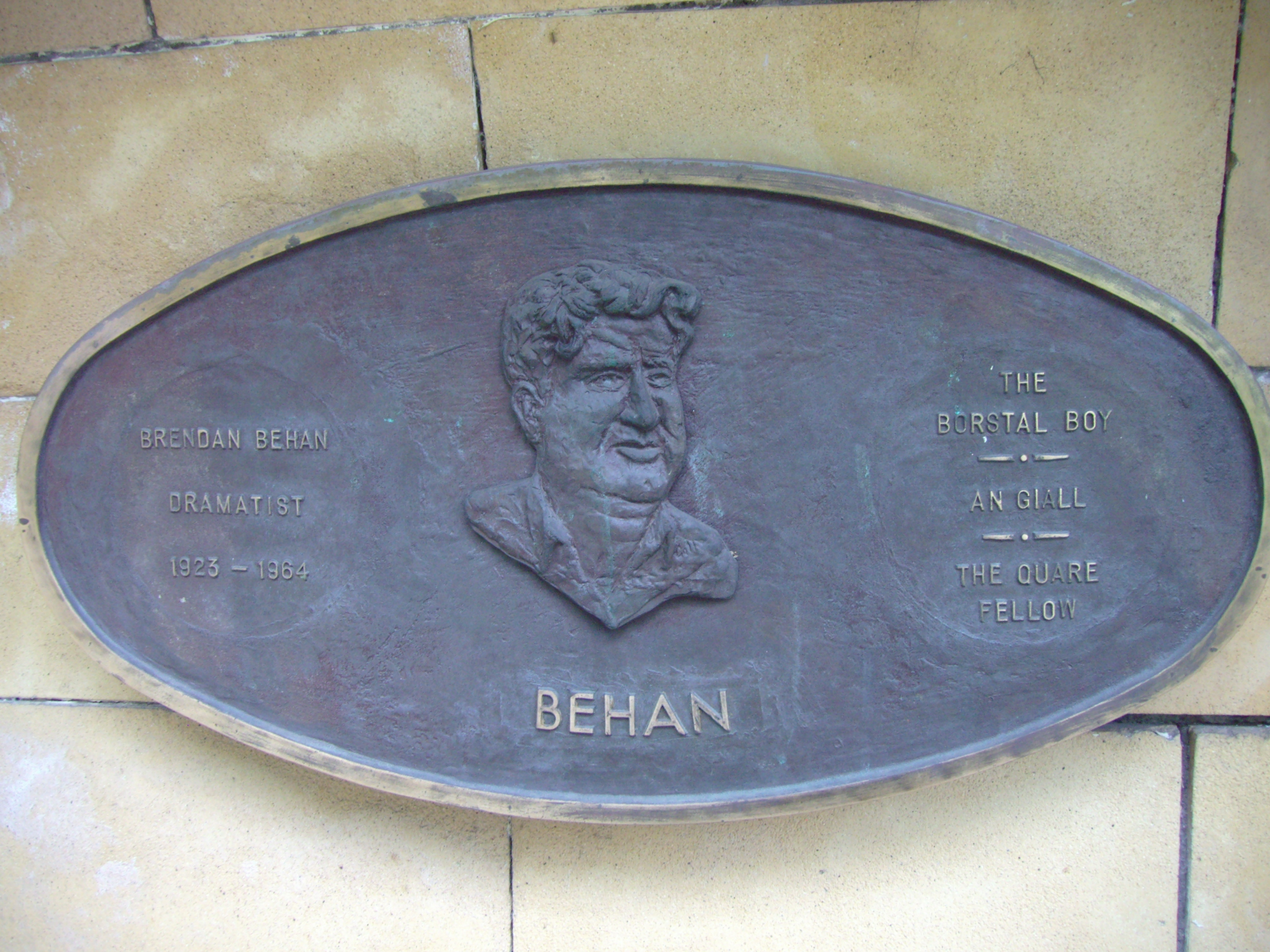 Brendan Behan (1923–1964), irischer Dichter; Plakette im Saint Patrick's Park, Dublin, dort angebracht anlässlich der Dublin Millennium 988–1988 Literary Parade